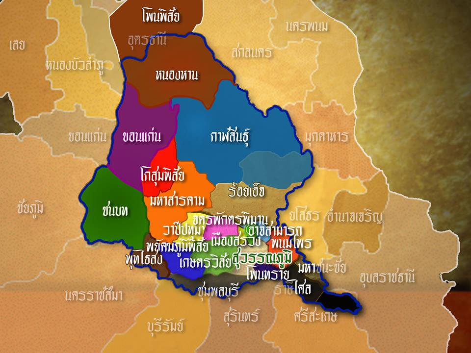 เป็นเเผนที่อาณาเขตทั้งหมดของนครรัฐทุ่งศรีภูมิ เริ่มก่อตั้งเมื่อปี พ.ศ. 2256 โดยต่อมาเมืองทุ่งศรีภูมิ ได้แบ่งอาณาเขตออกให้ ทายาทของเจ้าแก้วมงคล ได้ปกครองหลายเมือง